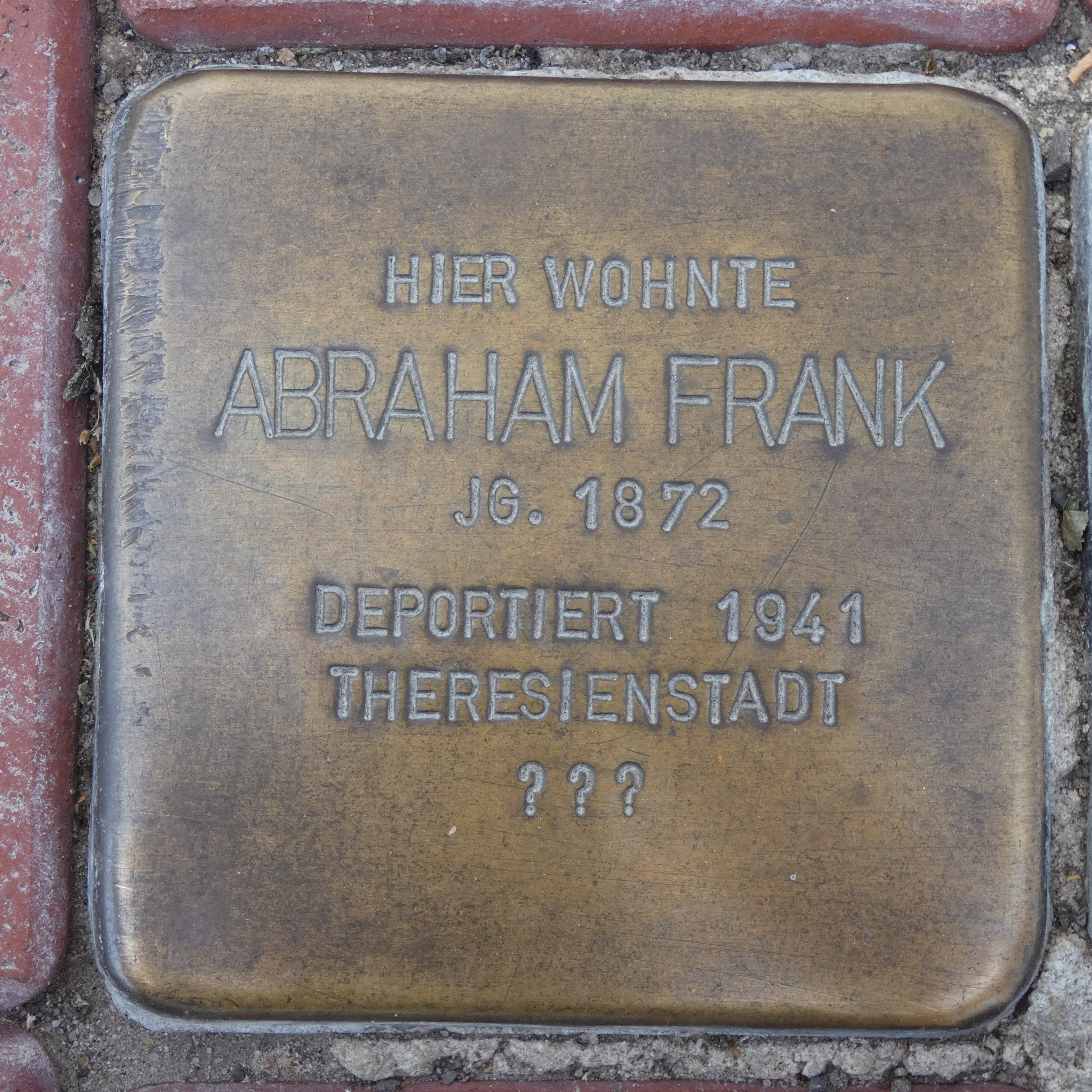 Hier wohnte Abraham Frank, Jg. 1872, deportiert 1941, Theresienstadt, ???